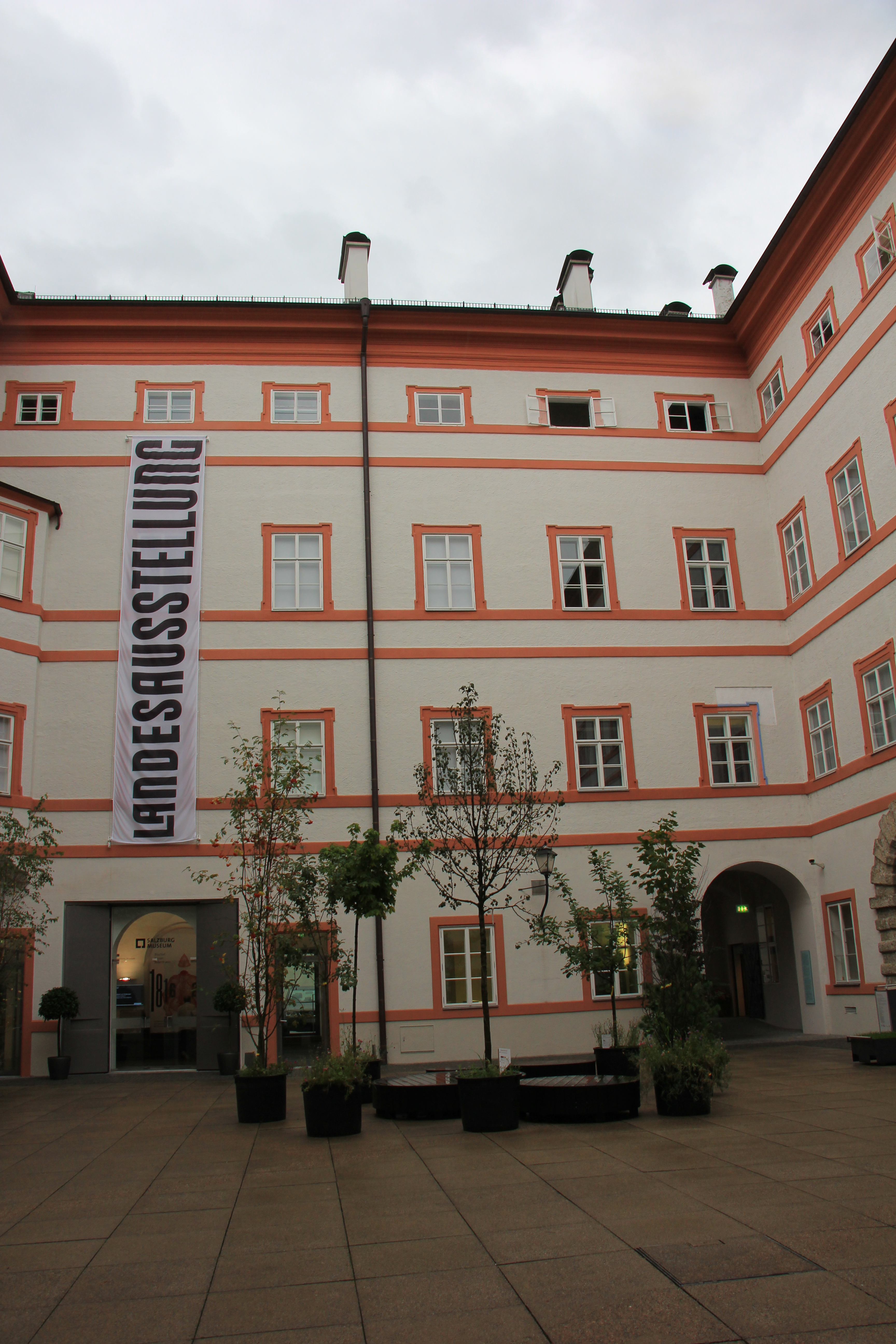 Innenhof des Salzburg Museums